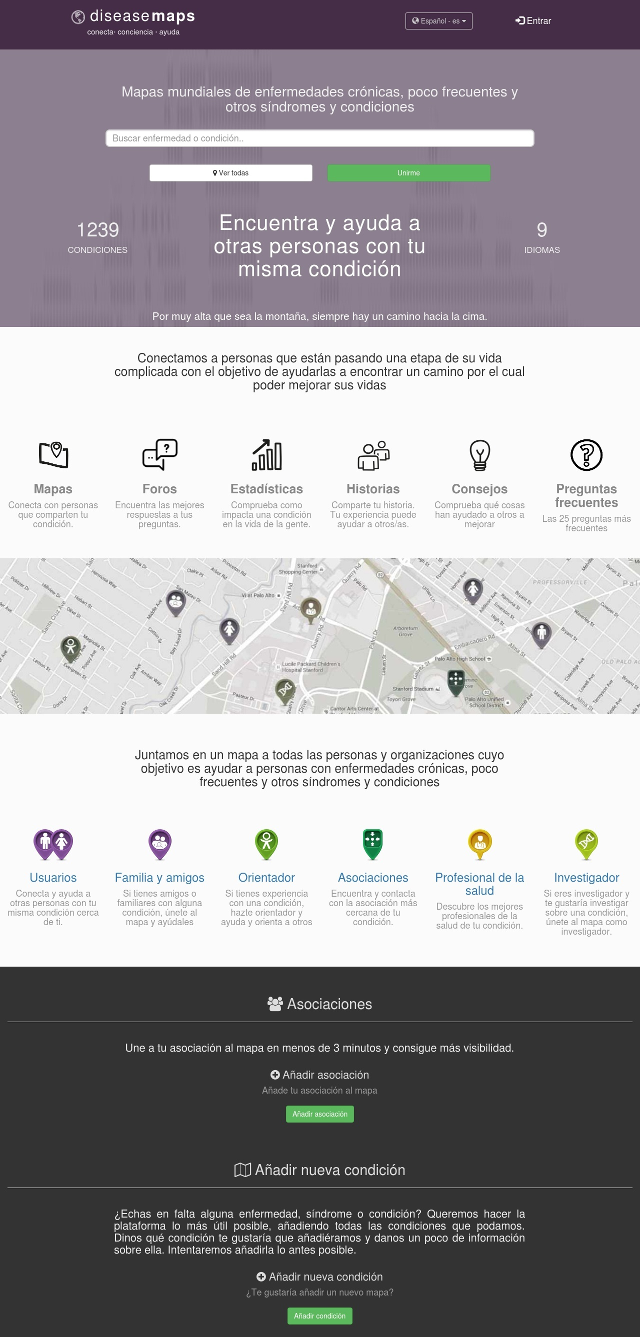 Captura de pantalla de